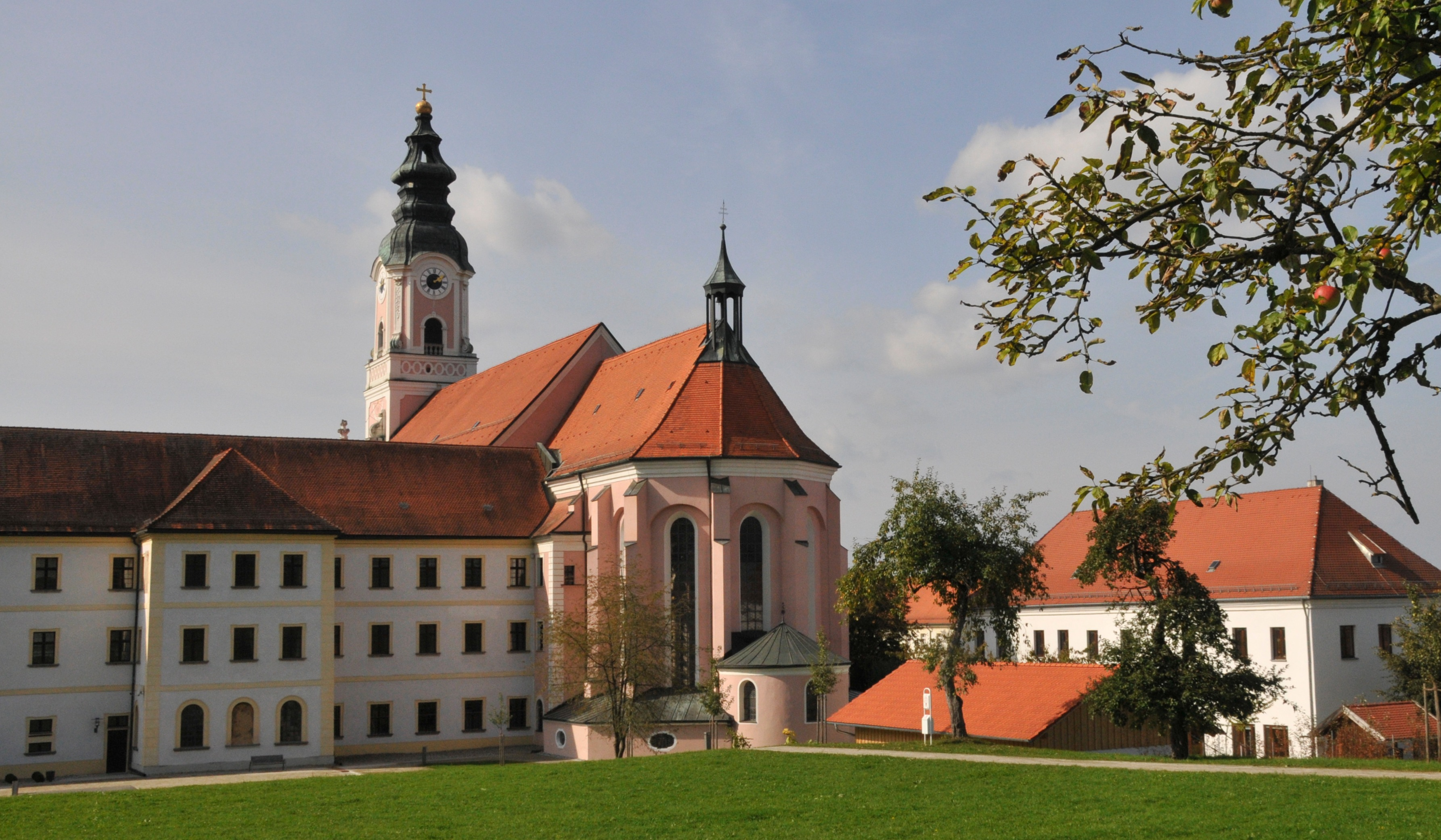 Aldensbach, KLosterkirche von Osten